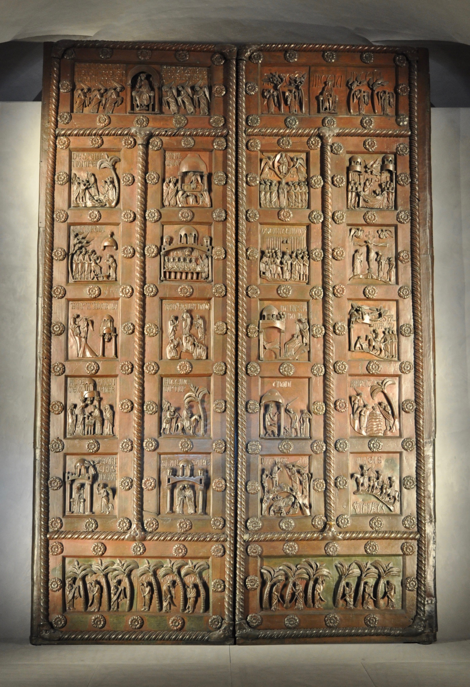 Porta di San Ranieri (originale) di Bonanno Pisano all'interno del museo dell'Opera del Duomo di Pisa nella nuova esposizione del 2019